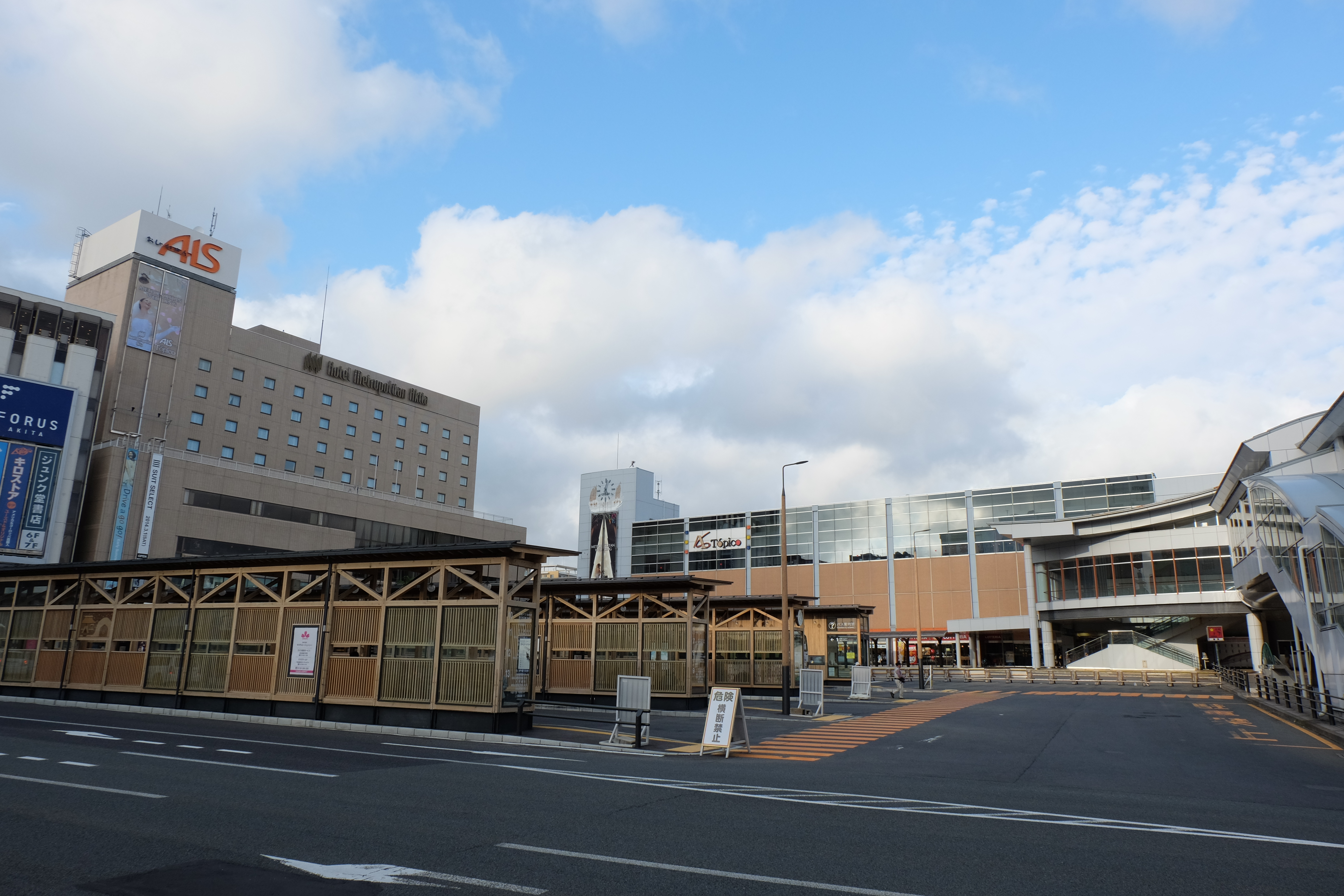 秋田駅西口バスターミナルの様子